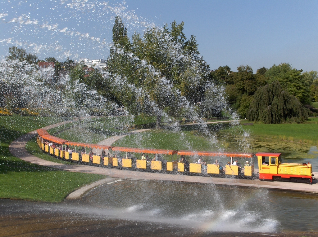 Höhenpark Stuttgart-Killesberg mit Kleinbahn